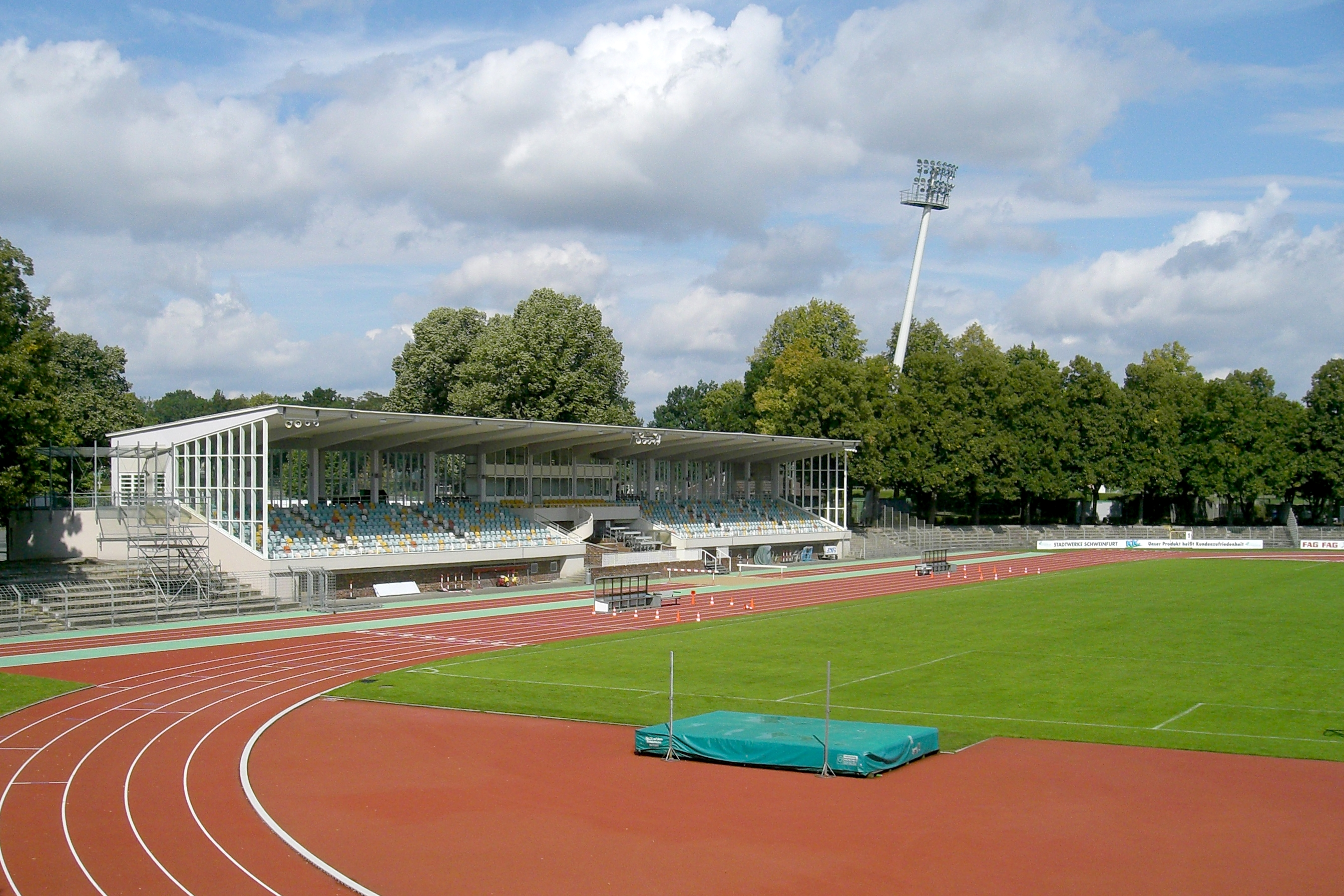 Willy-Sachs-Station in Schweinfurt